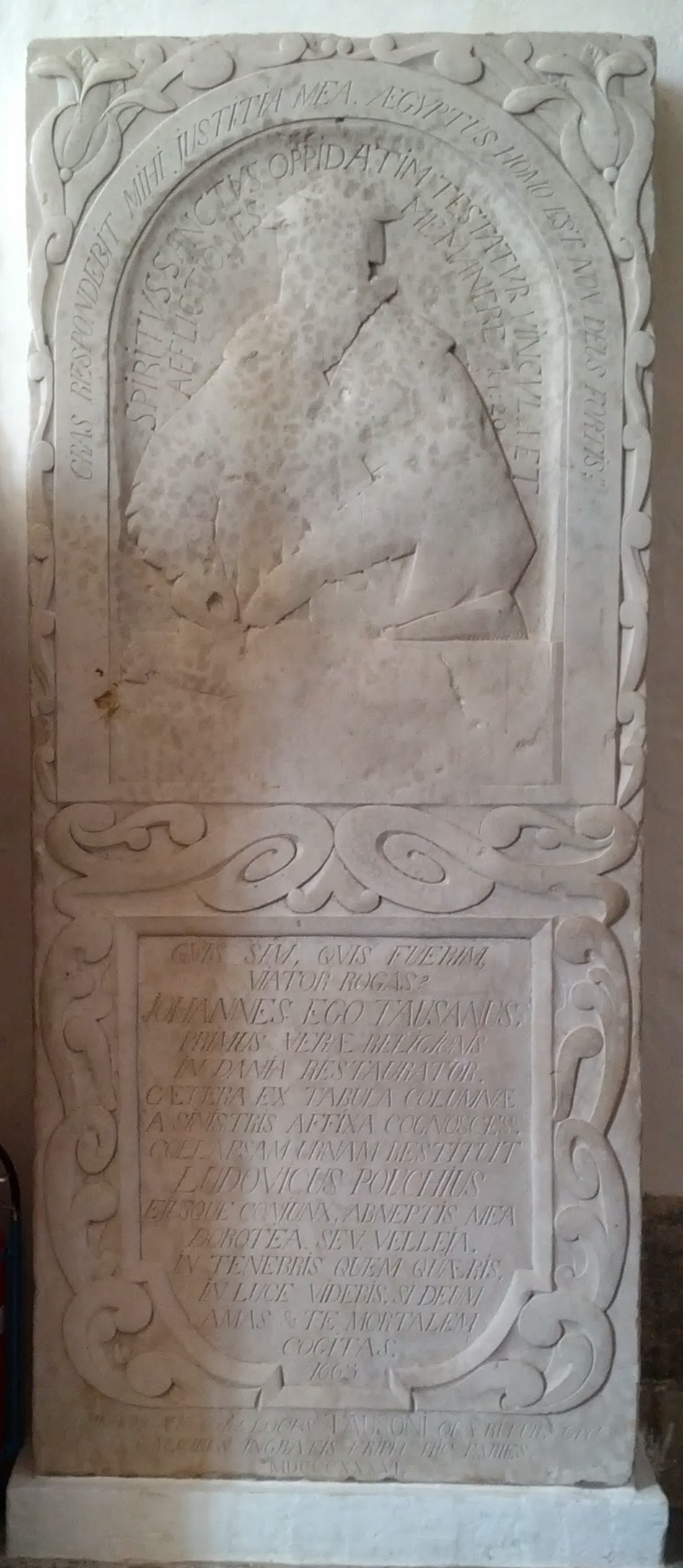 Sten over Hans Tavsen til venstre for døren til trappeopgangen i Ribe Domkirke. Stenen er opsat 1663 - »Den sammenstyrtede gravurne istandsatte Ludvig Pouch og hans hustru, mit (Tausens) tipoldebarn Dorotea Sev. Velleja (Sørensdatter Vedel)« I anledning af reformationsjubilæet 1836 blev stenen renoveret, og billedet af Tavsen hugget "i samme smag som den før har været, da der endnu kunne findes spor heraf«. Stenens indskrifter blev hugget op med nye bogstaver. (Danmarks Kirker, Viborg Domkirke p. 230)